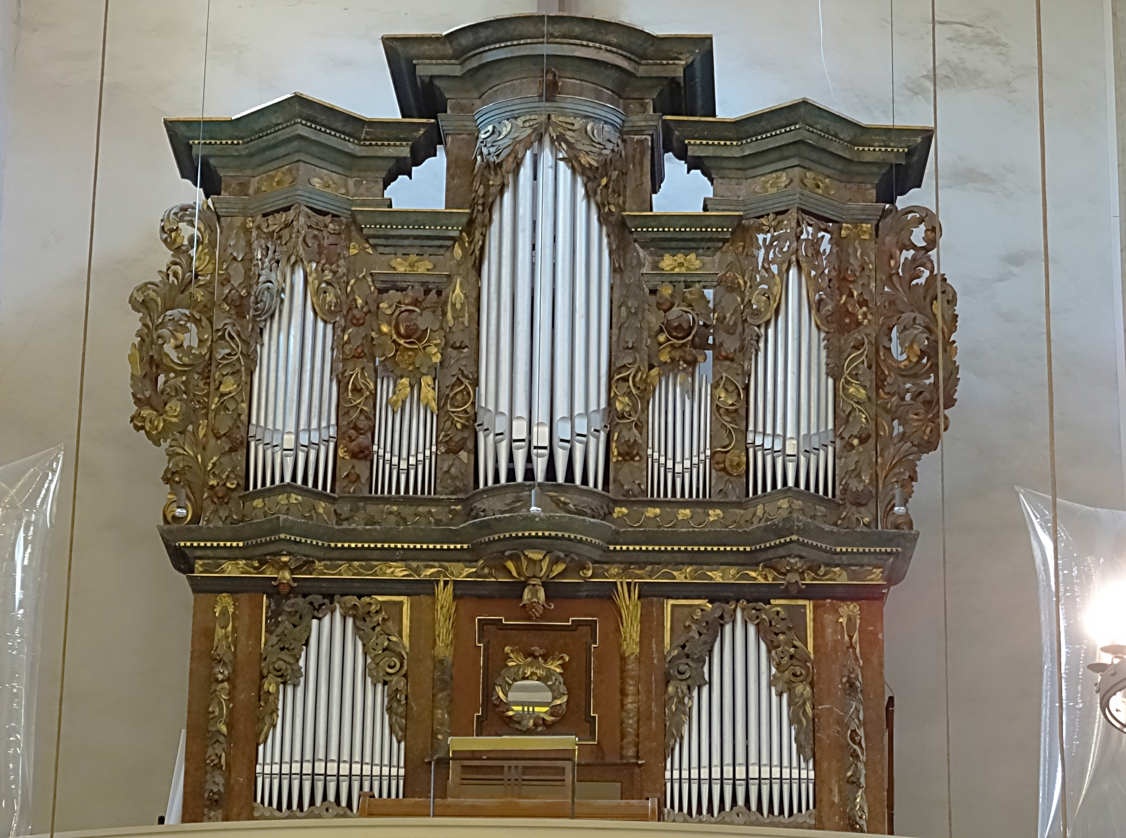 Orgel der Kaufmannskirche Erfurt von Schuster und Sohn (1957, III/P 39) unter Verwendung der Rühlmann-Orgel von 1911 (III/P 42) und dem Prospekt (1687) von Christoph Junge [1]